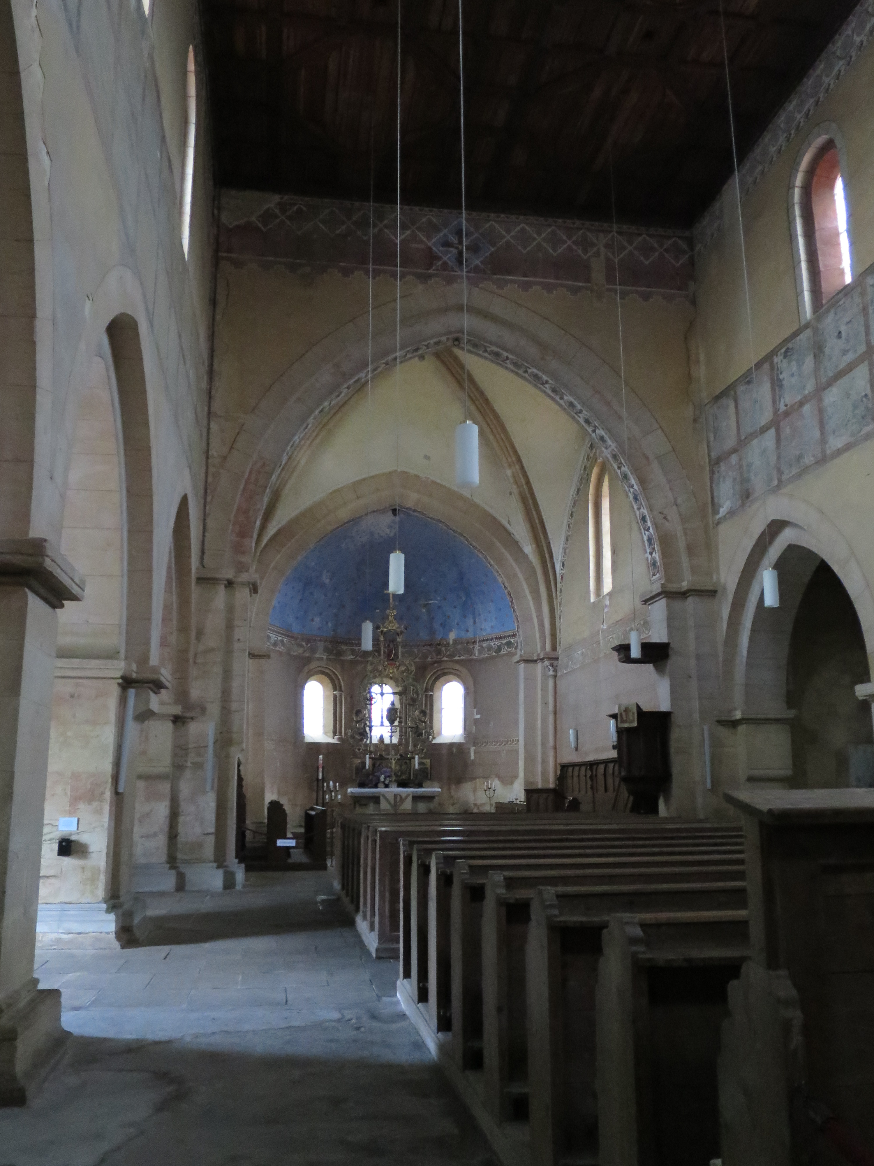 Innenraum der romanischen Pfeilerbasilika St. Nikolai.